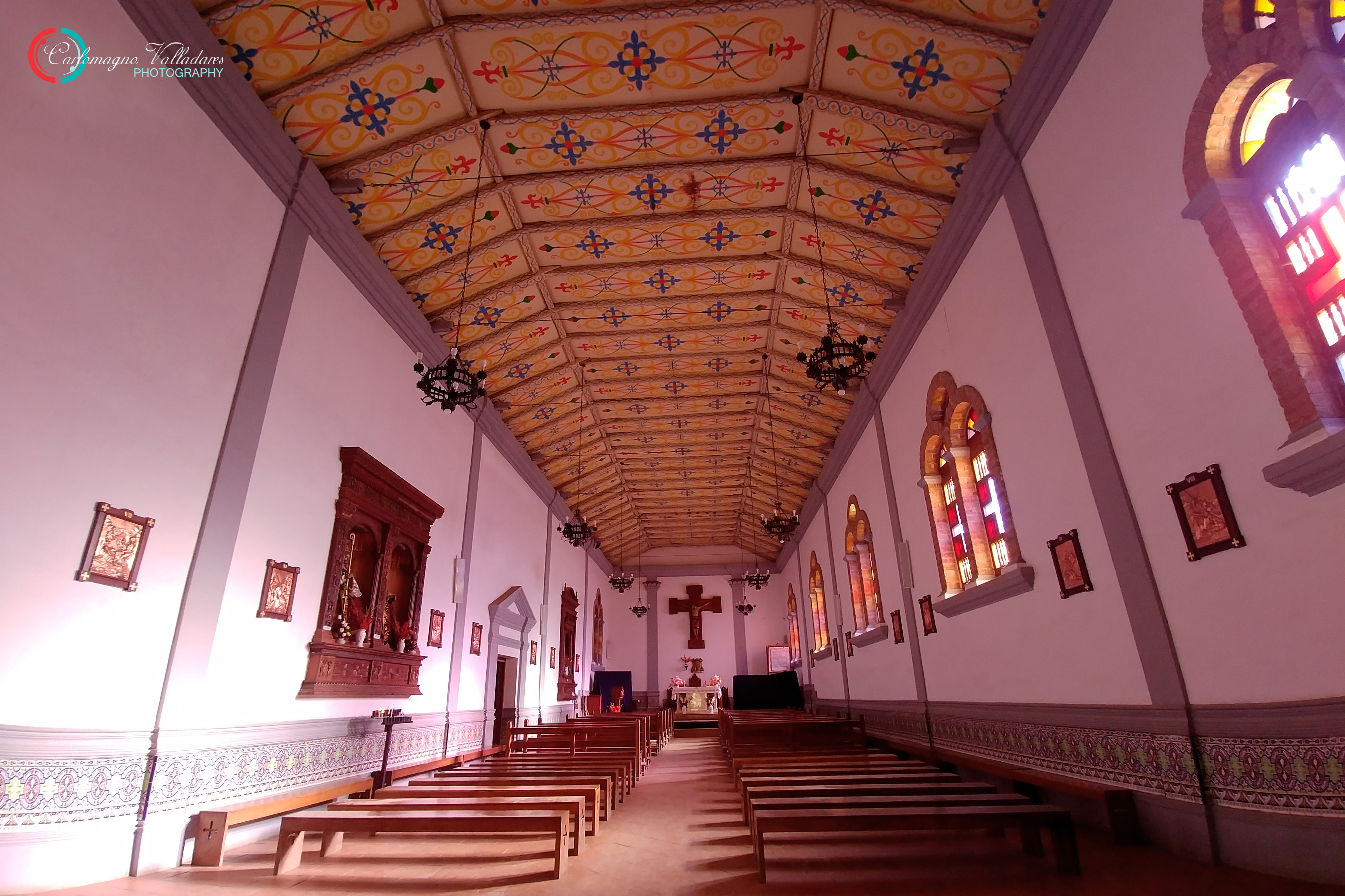 Interiores